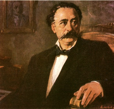 Painting of Tigran Chukhajian.